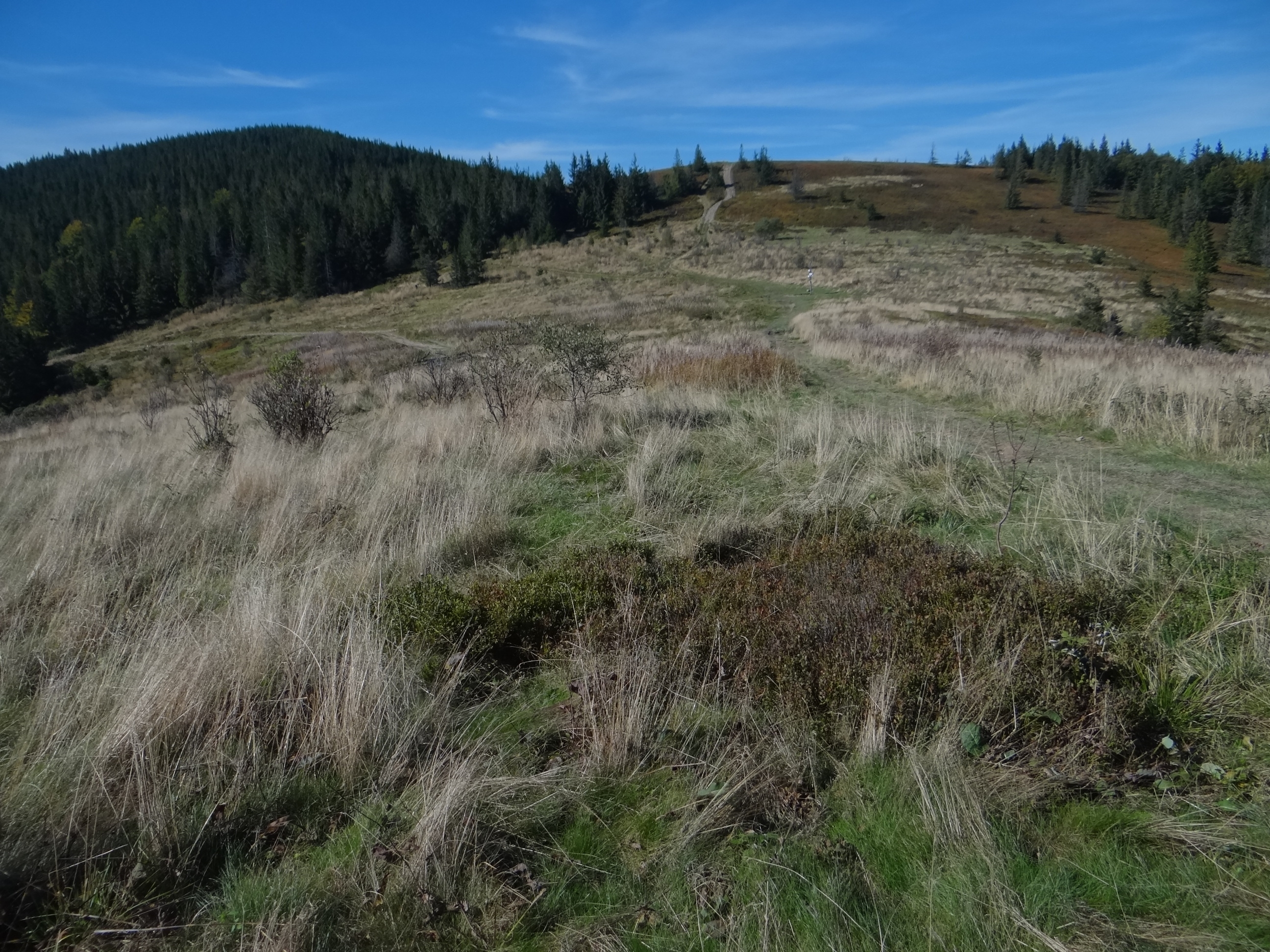 Hala Kucałowa. Widok na Złotą Grapę, Kucałową Przełęcz i Jasną Górę